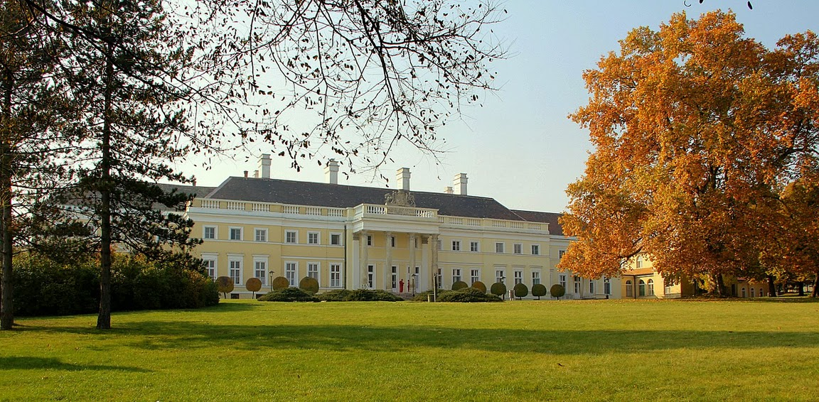 Esterházy-kastély együttese, Csákvár This is a photo of a monument in Hungary. Identifier: 3588